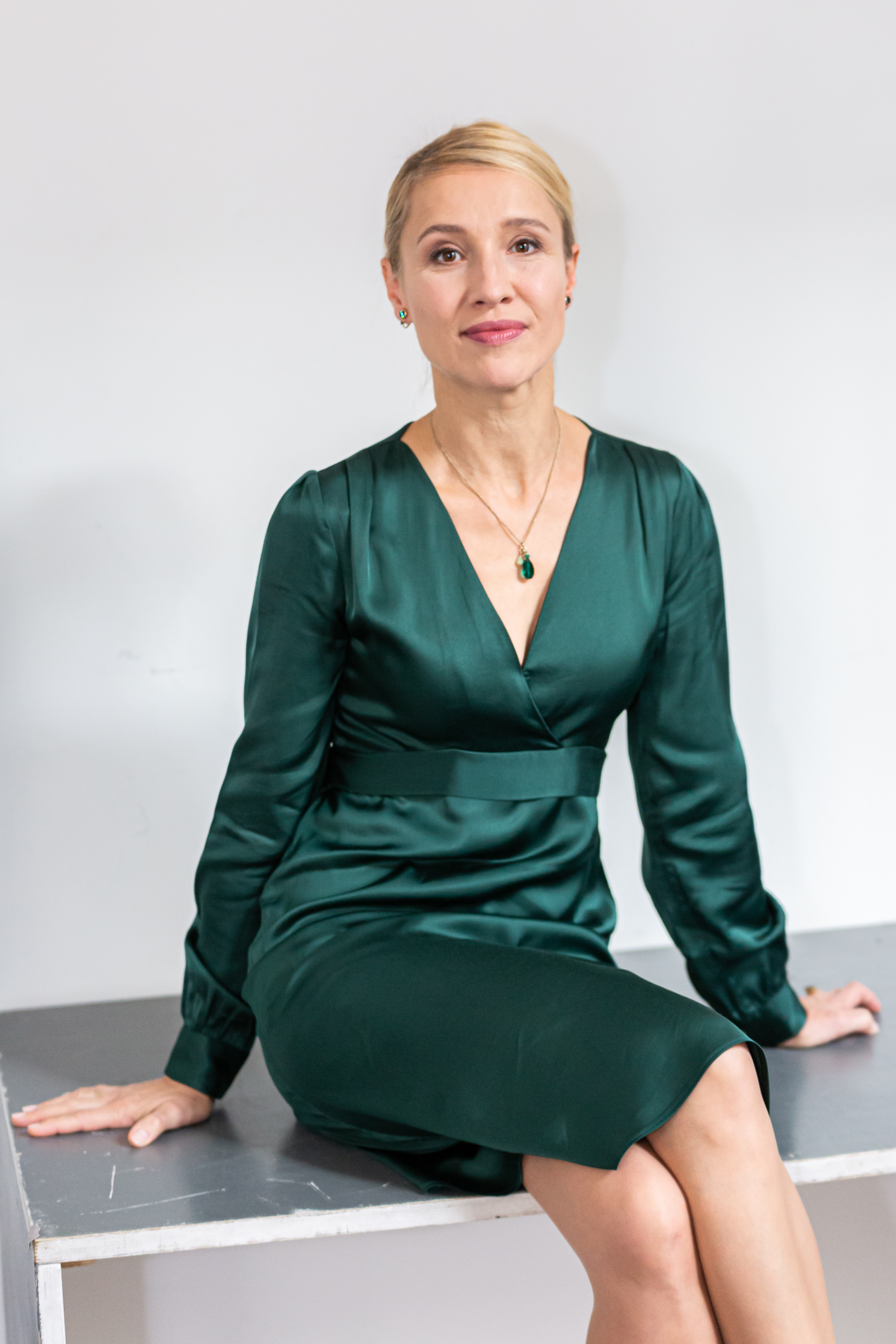 TV, ARD, Cast "Rote Rosen" Staffel 16; Solveig August